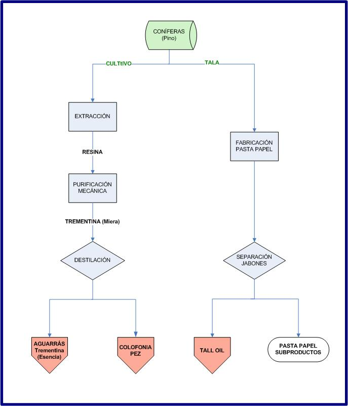 Esquema tratamiento de la resina